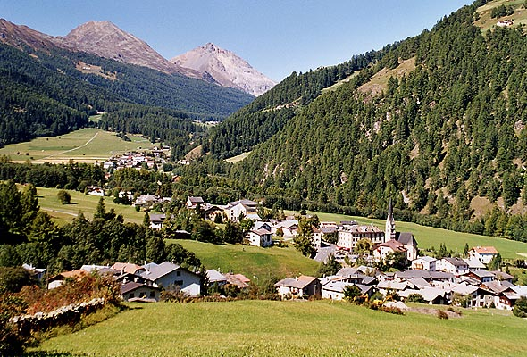 Blick auf Santa Maria Val Müstair